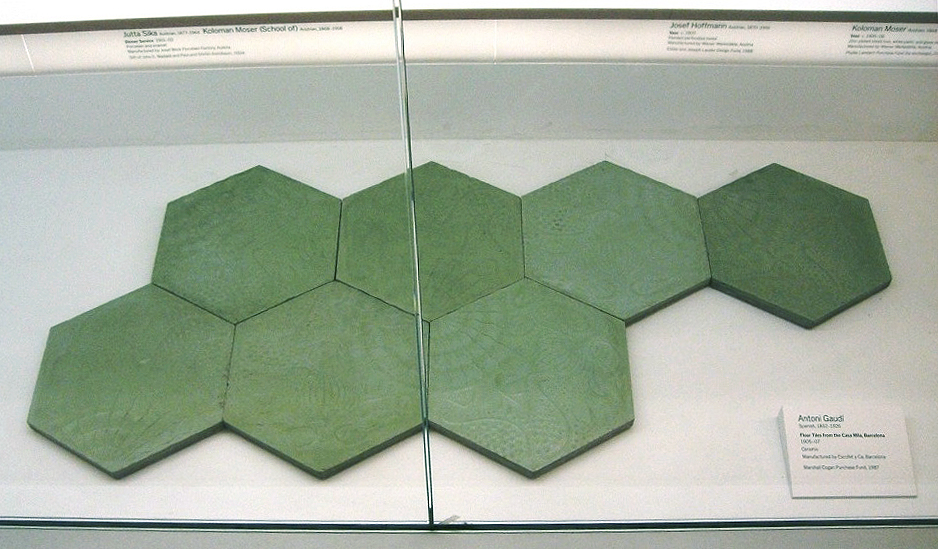 PANOT GAUDI EN EL MUSEO MOMA DE NEW YORK